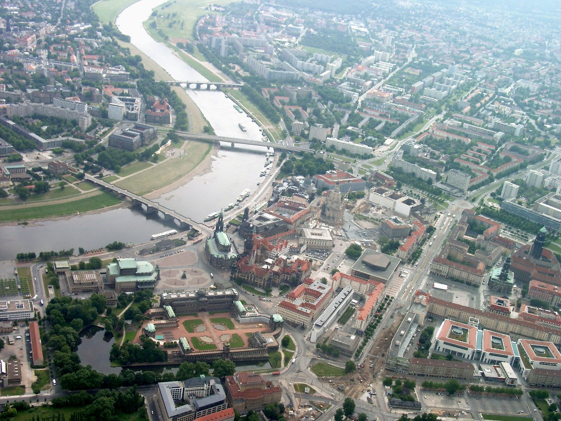 Dresdner Altstadt Sommer 2005